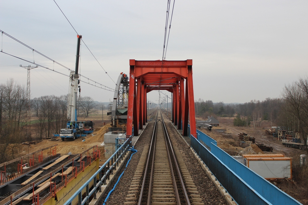 Most na Pilicy w ciąg Centralnej Magistrali Kolejowej.